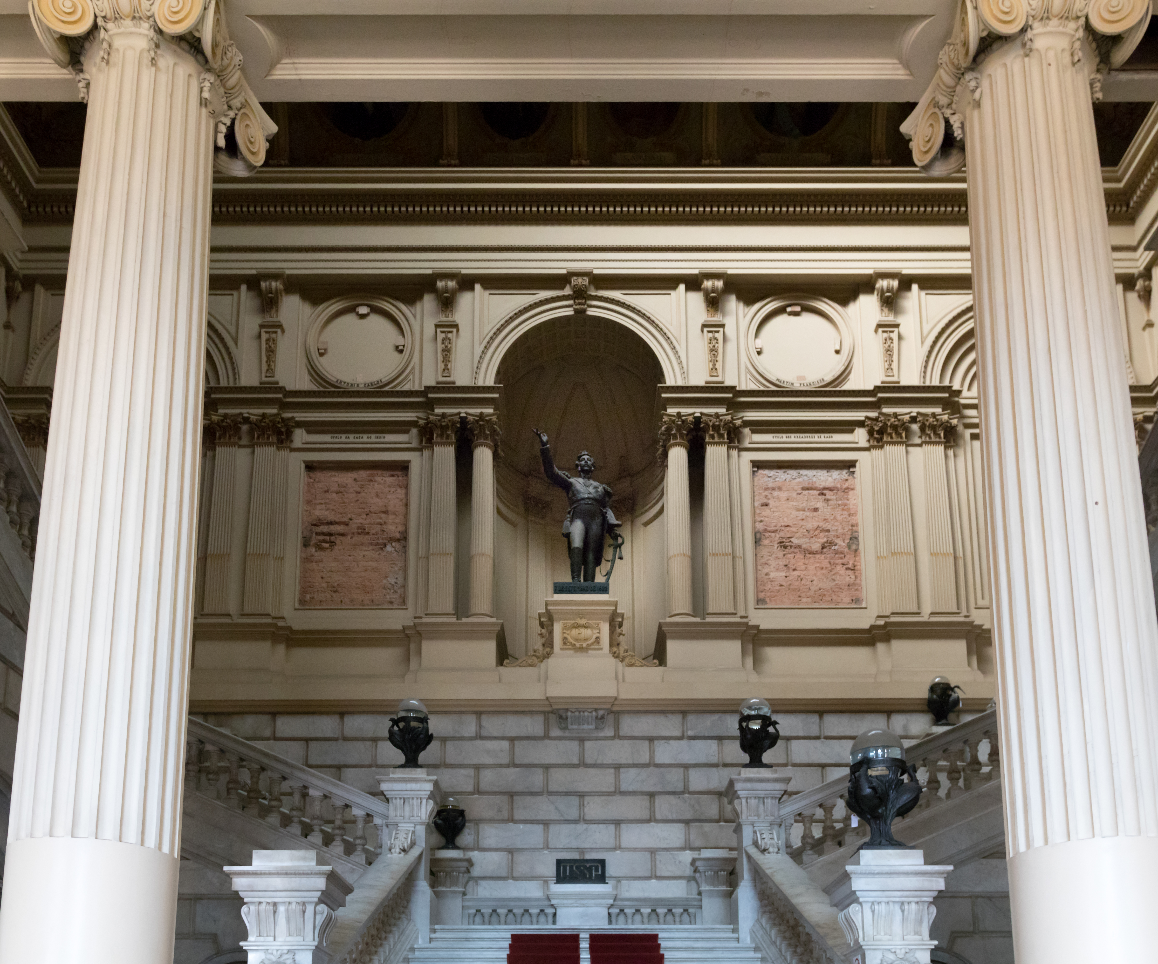 Museu Paulista em reforma